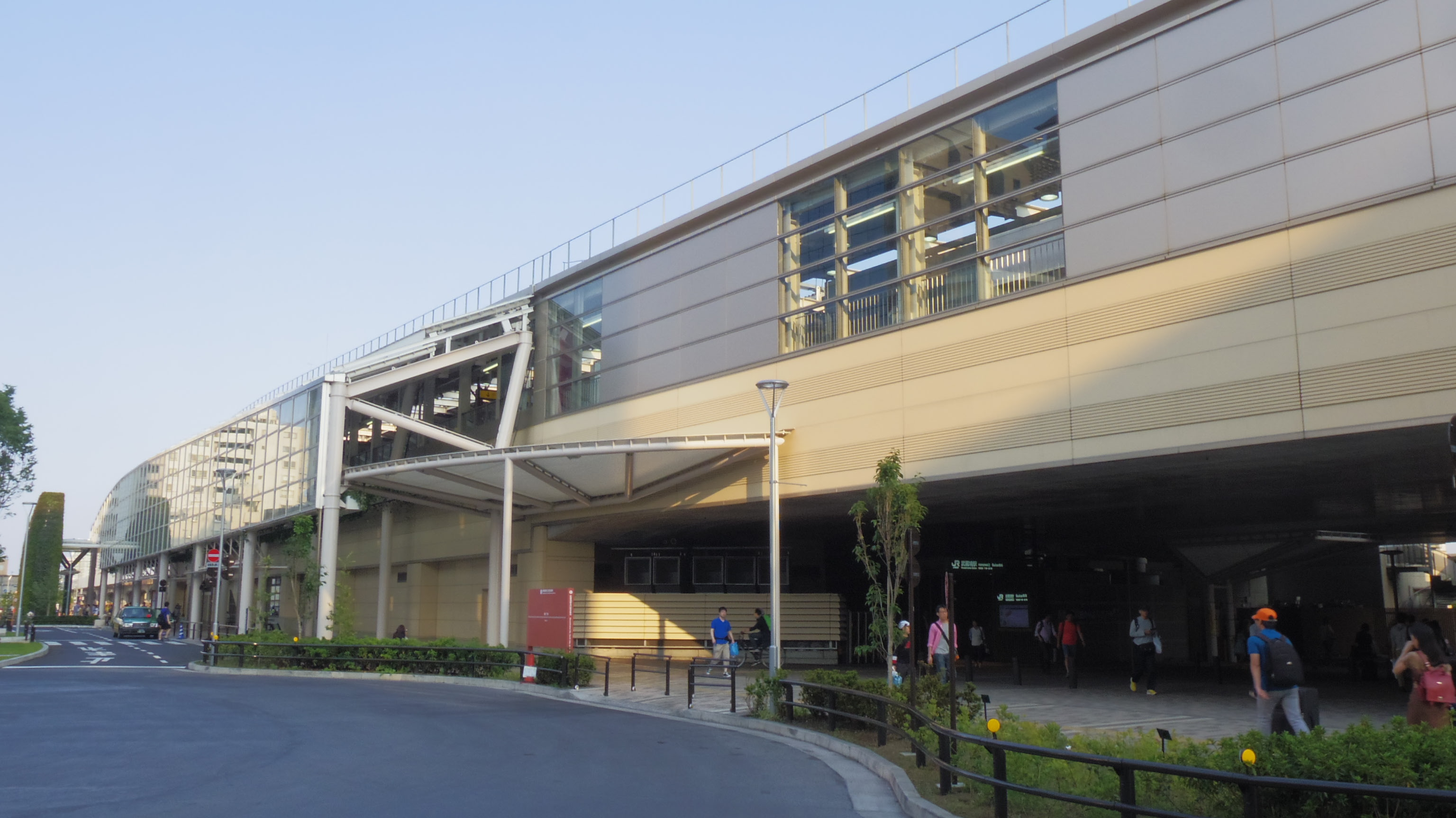 JR武蔵境駅北口駅舎（2016年5月22日撮影）